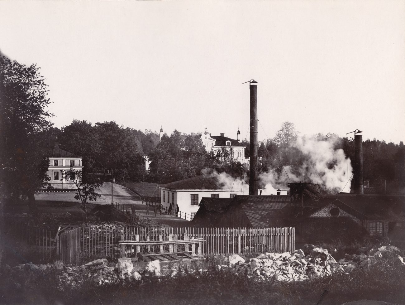 B9009. Färna bruk, exteriör med herrgården i fonden. Fotografiet är skänkt till Tekniska museet från Svenska Turistföreningen.